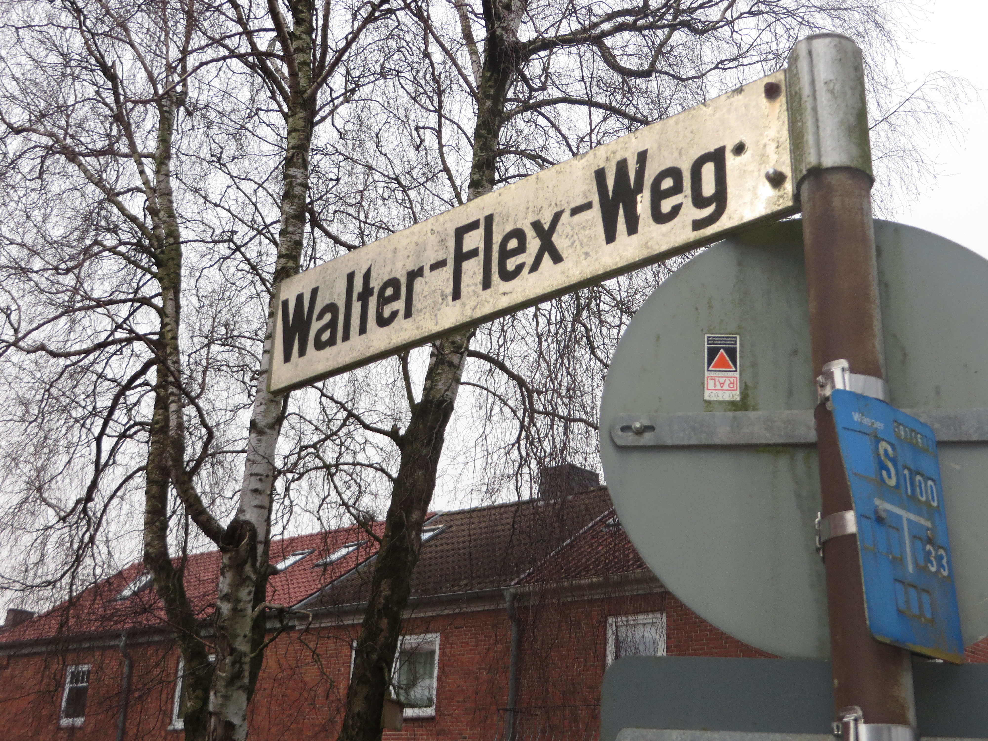 Straßenschild Walter-Flex-Weg (Flensburg 2016), Bild 04